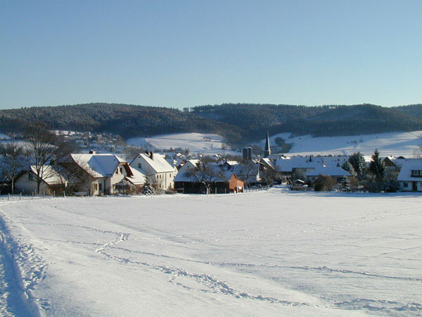 Ortskern von Bad Hersfeld-Asbach Fotograf: Harald Nitz